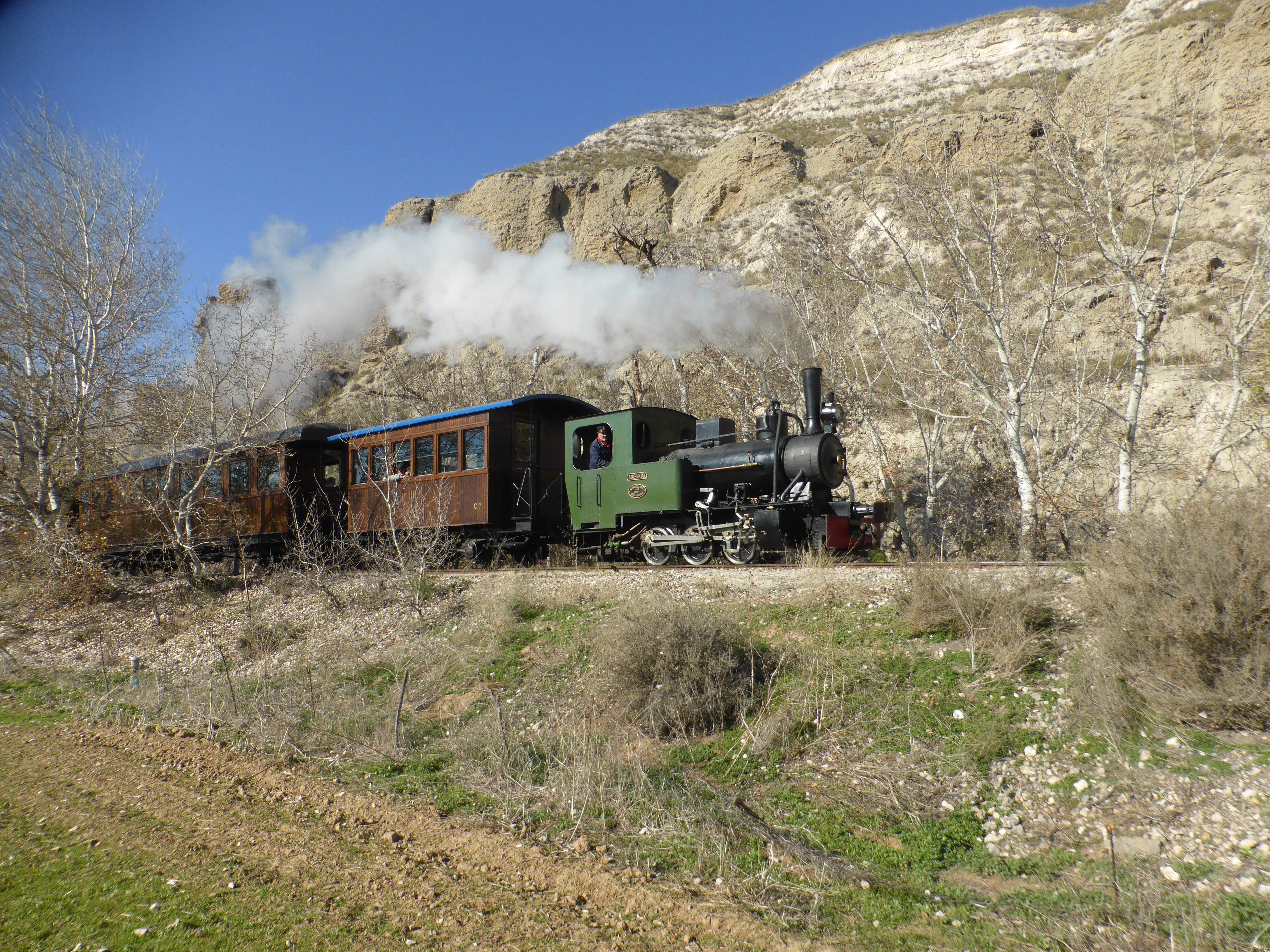 El "tren de Arganda" es un tren turístico histórico, que normalmente está encabezado por locomotoras de vapor. Sus talleres se encuentran en La Poveda, barrio de Arganda del Rey, Madrid, España. En esta fotografía, el tren está circulando al pie de los cantiles del término municipal de Rivas-Vaciamadrid.